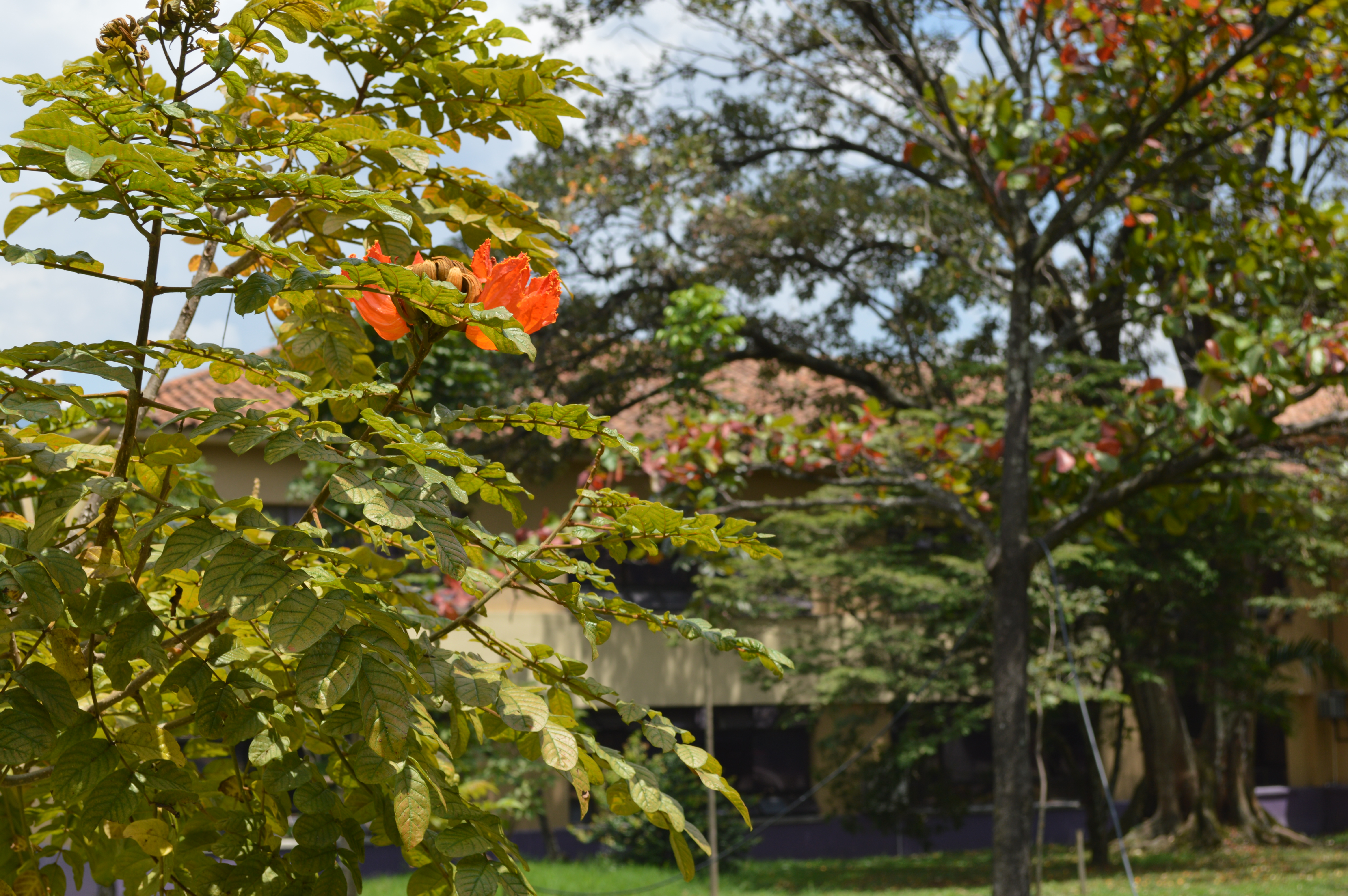 Foto trasera